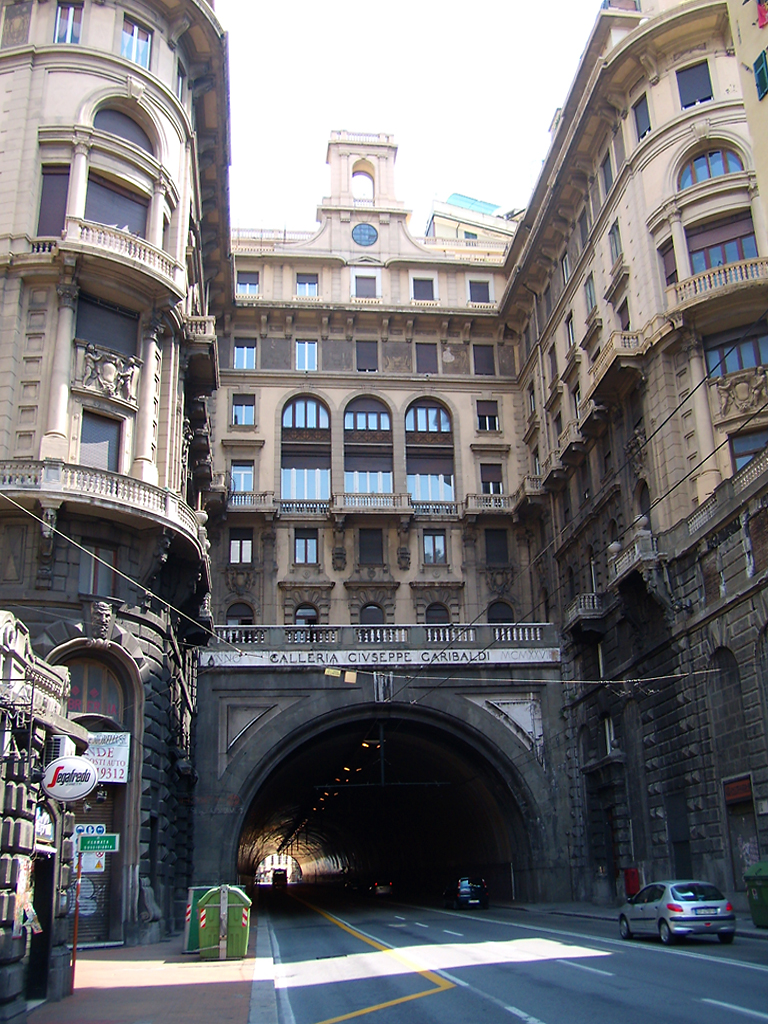 Galleria Giuseppe Garibaldi a Genova. L'imbocco ovest, lato largo della Zecca.